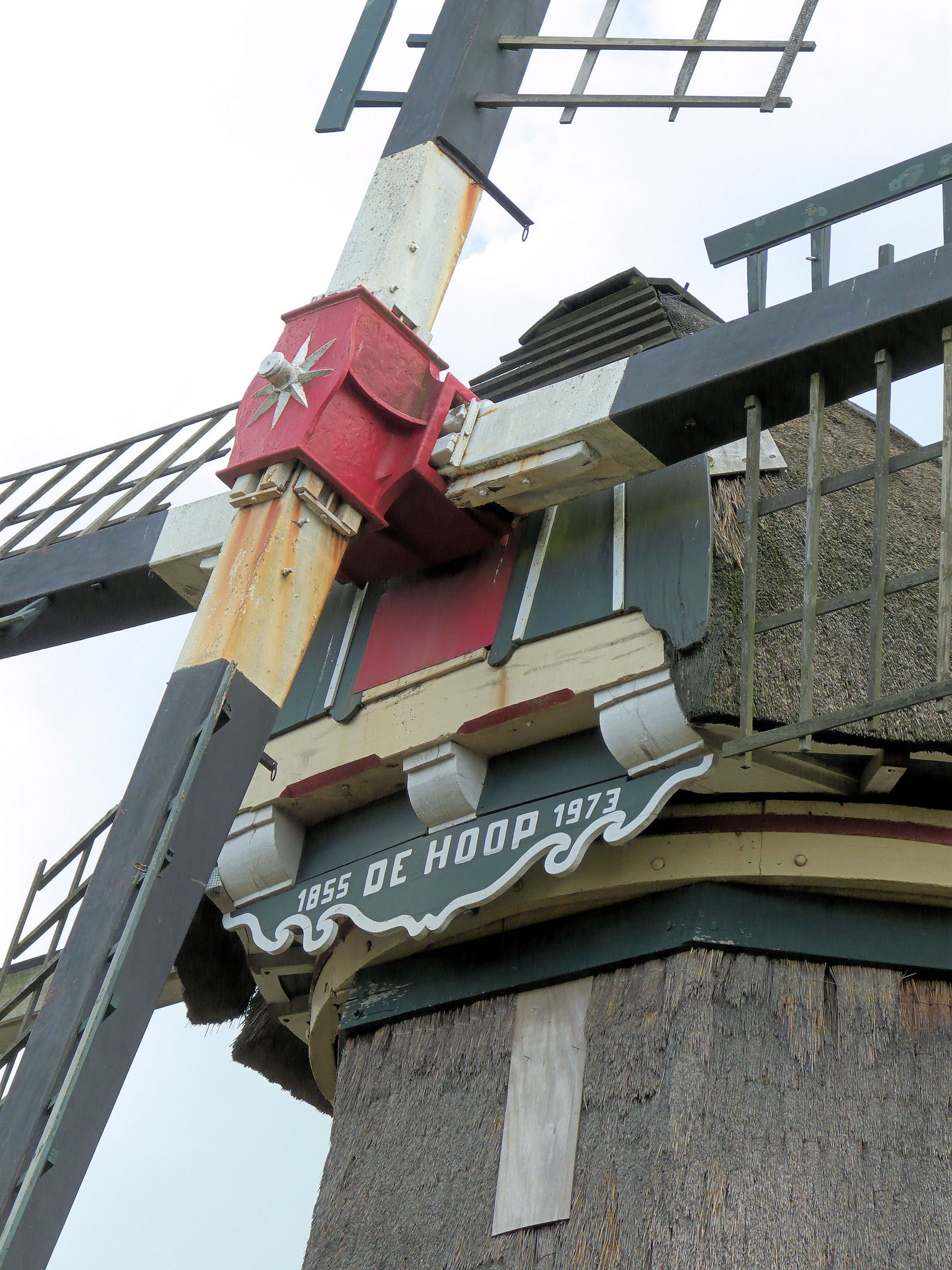 De Hoop, Lunteren 20 juni 2009, askop met baard